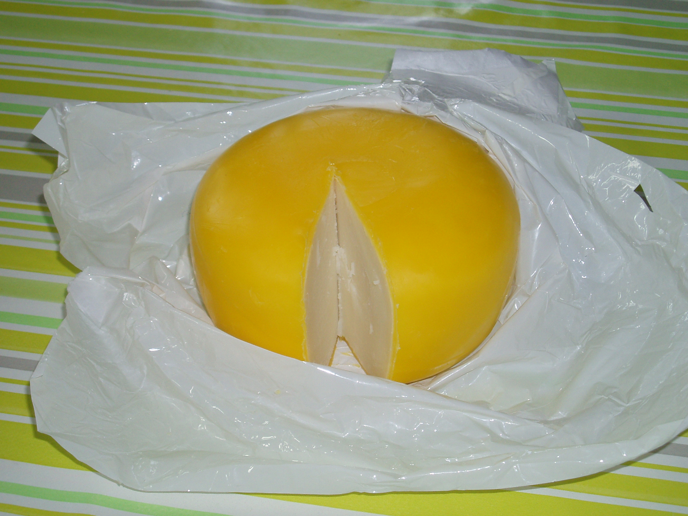 Hooidammer geitenkaas jong biologisch